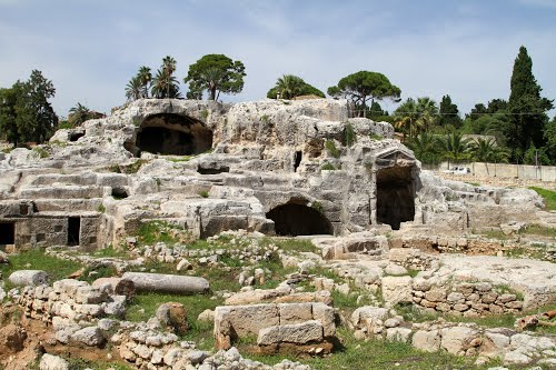 Necropoli e presunta tomba di Archimede